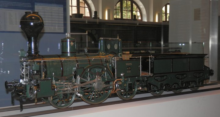 Lok A 13 der Bayerischen Ostbahn (später bei der Staatsbahn in der Baureihe B IX Ostbahn eingereiht). Modell im Maßstab 1:10 im Verkehrsmuseum Nürnberg